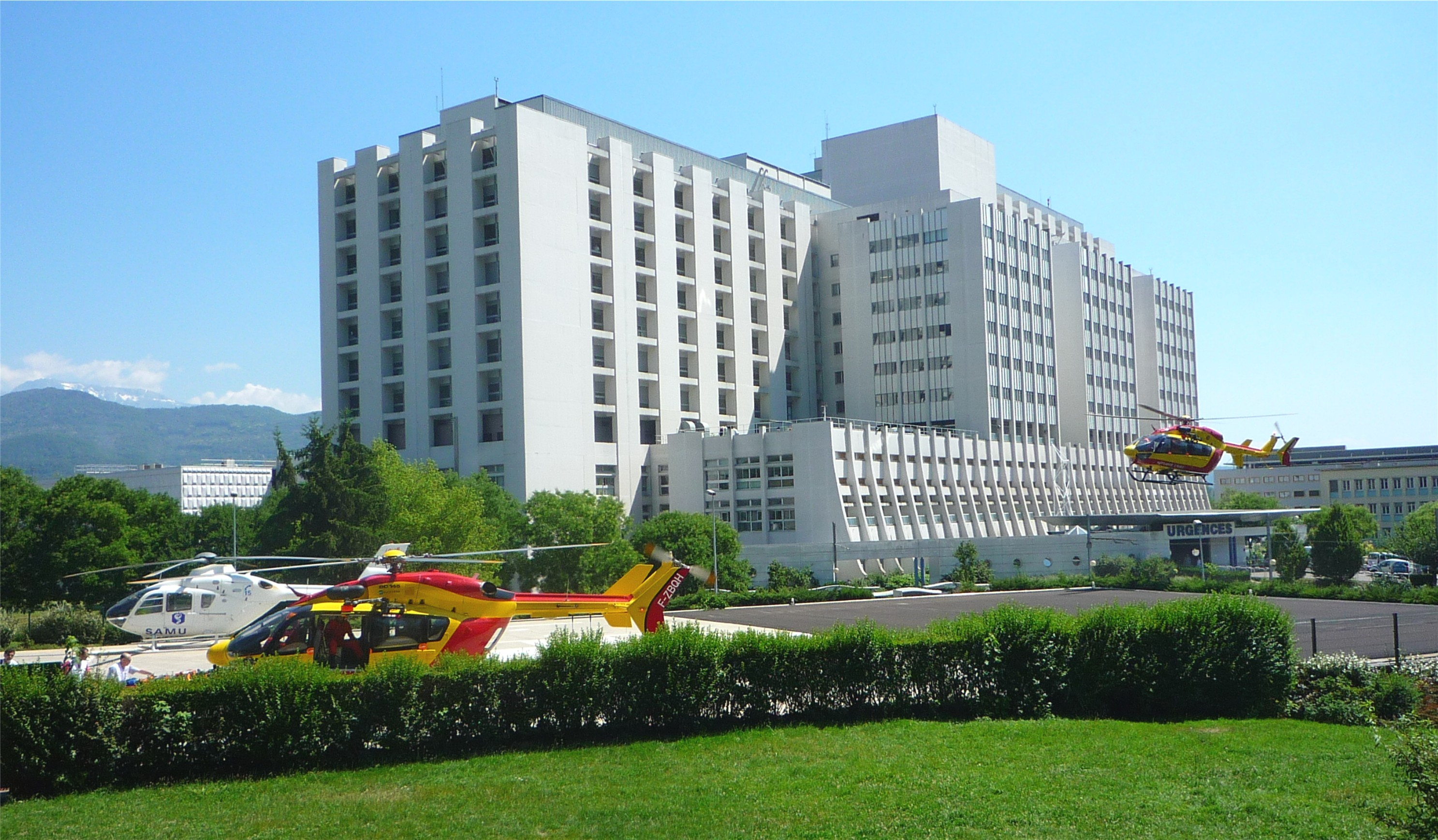 Héliport de l'hôpital Michallon à La Tronche près de Grenoble.